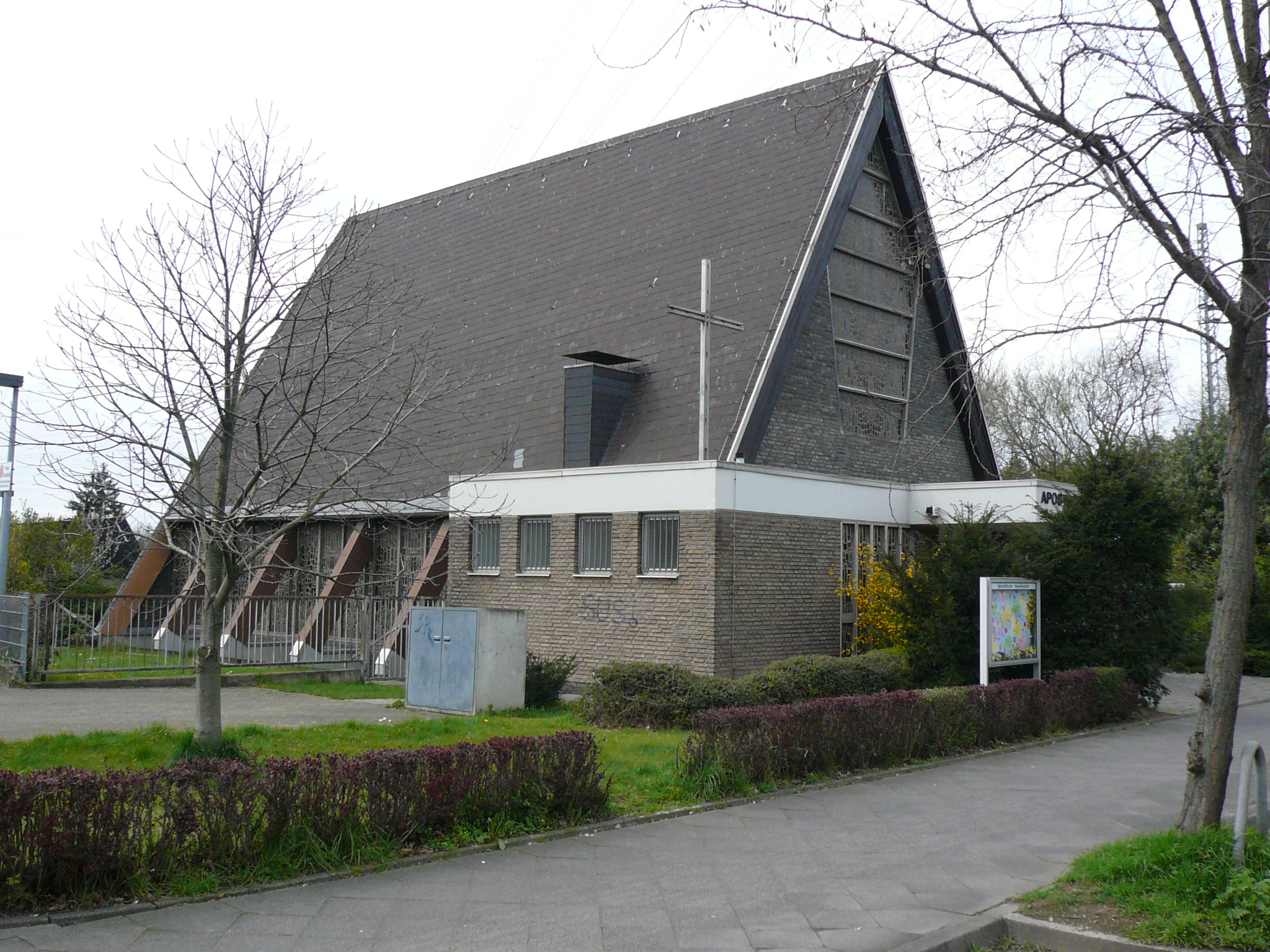 Apostolische Gemeinschaft - Gemeinde Düsseldorf-Eller